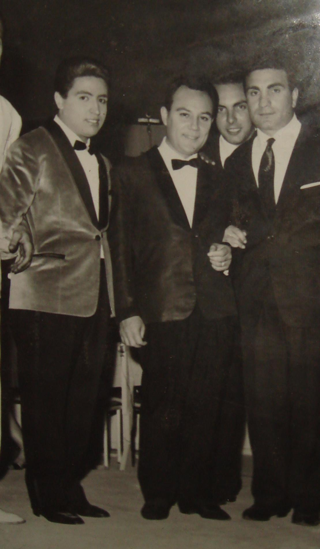 Autore della foto: Mario Trevi. La fonte è lo stesso signor Trevi, che me l'ha fornita. Raffigura Mario Trevi e Claudio Villa nel 1962, al Festival di Piedigrotta.